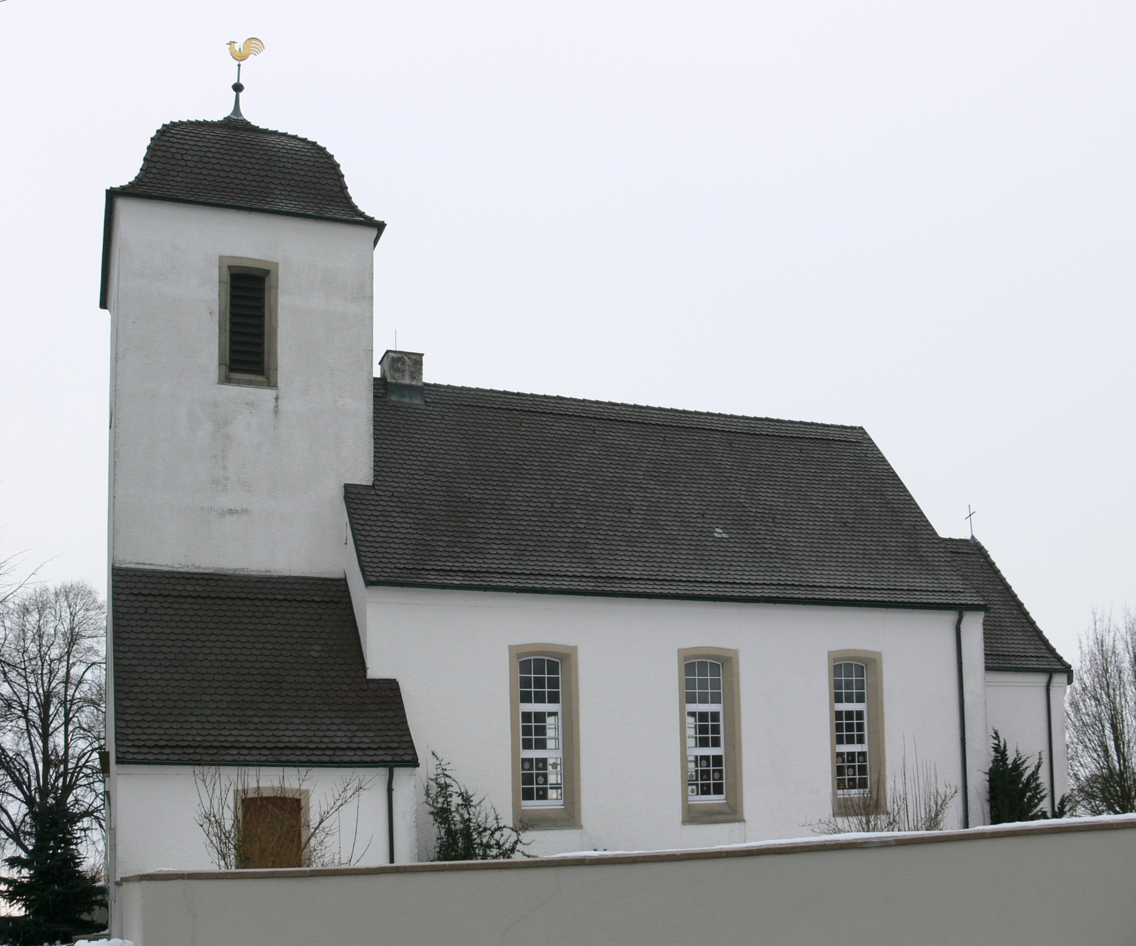 Ravensburg, Germany: Evangelische Kirche Bavendorf. Architekt: Prof. Wilhelm Jost. Erbaut etwa 1926.